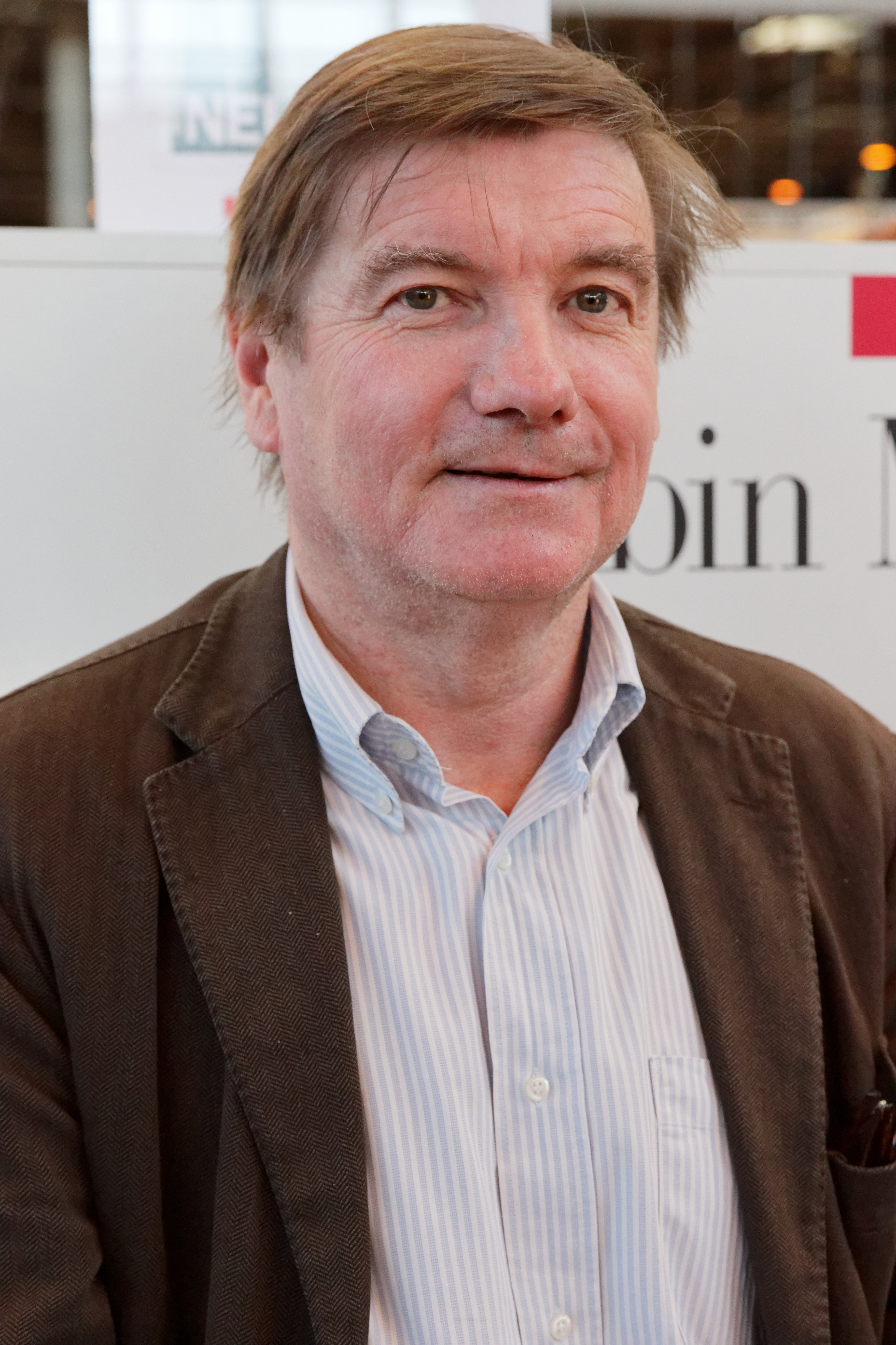 Eric Neuhoff en dédicace lors du salon du livre de Paris 2017.